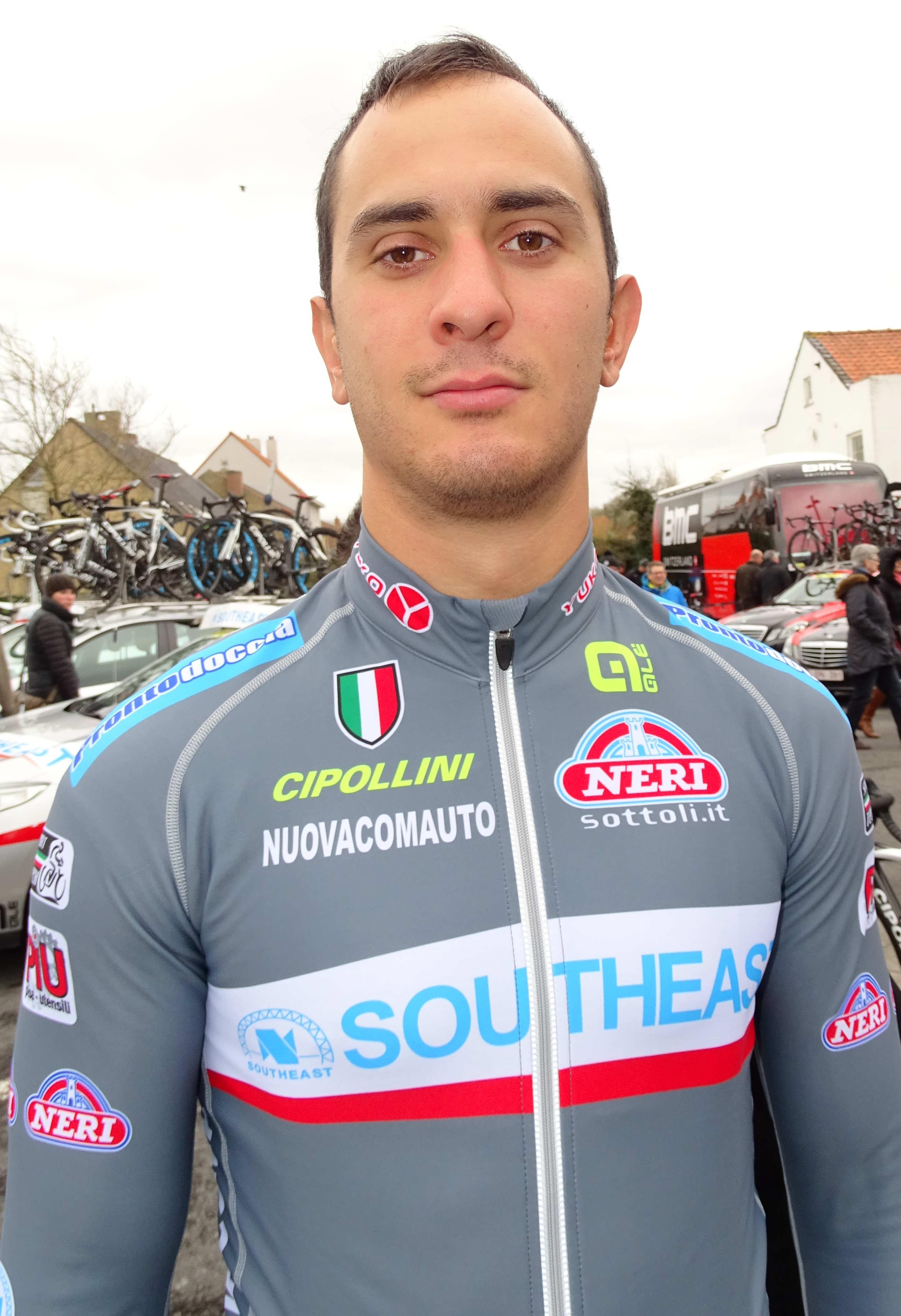 Reportage réalisé le mardi 31 mars à l'occasion de du départ de la première étape des Trois jours de La Panne 2015 à La Panne, Belgique.